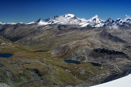 Masiv Gran Paradiso od Lago Rosset